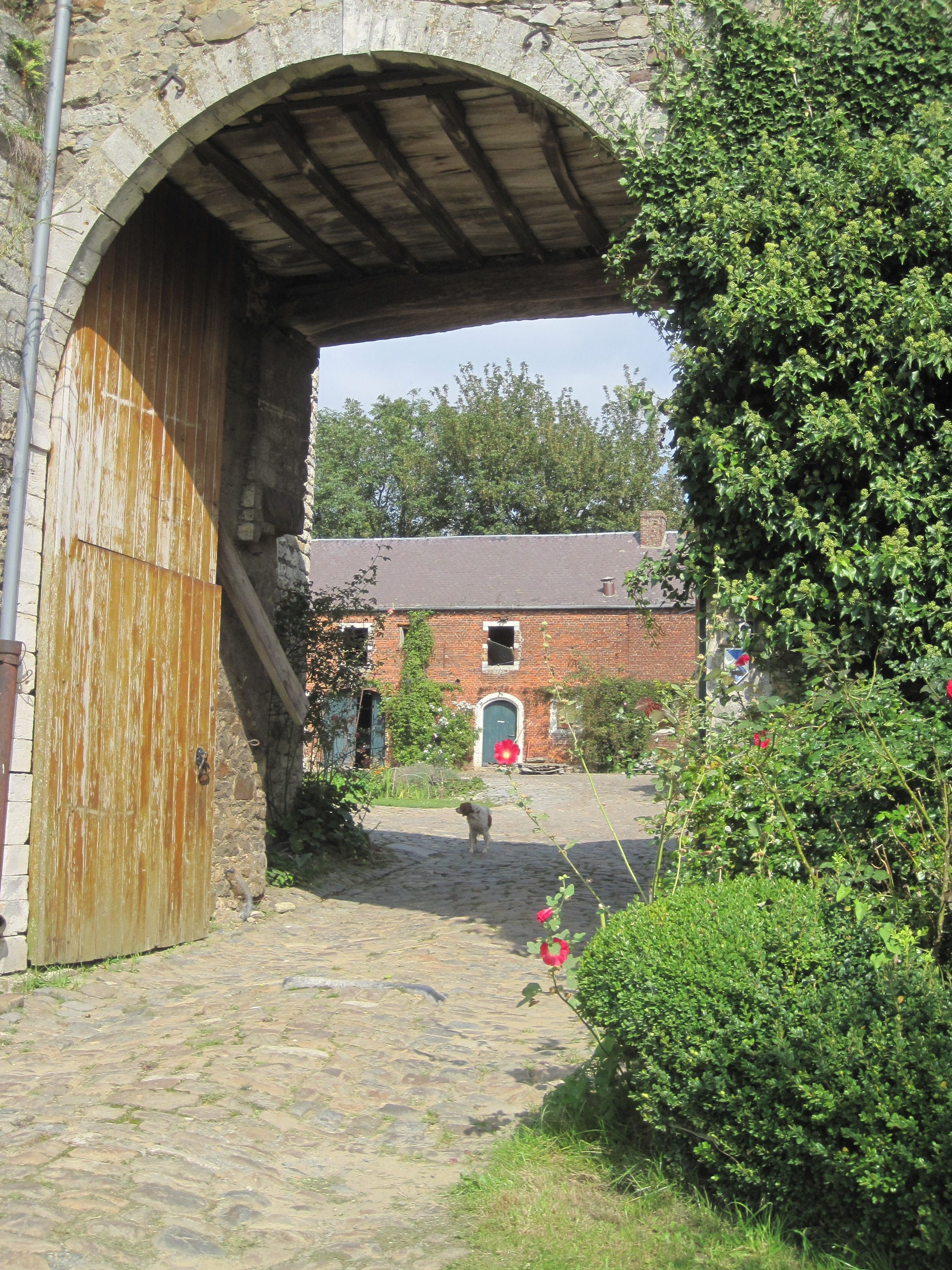 Ruines du château d'Opprebais : tours, donjon, courtines et grange (M# et ensemble formé par ces ruines, l'église, le cimetière et les terrains environnants #S#.